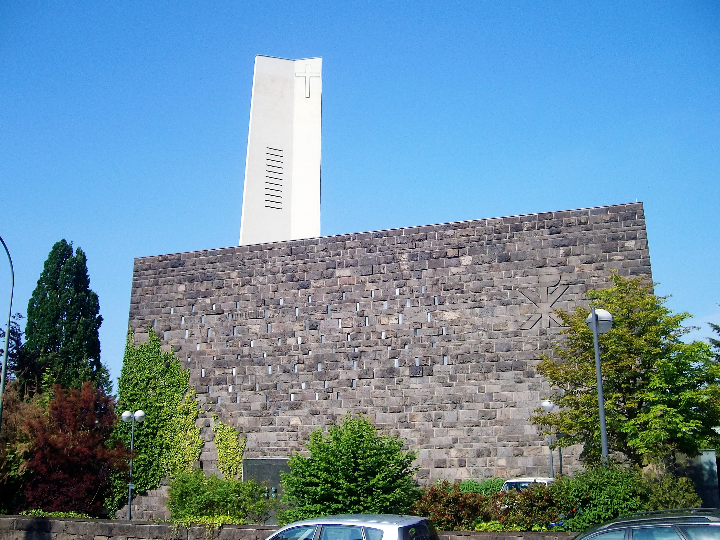 Petruskirche, Gießen, Hessen, Deutschland